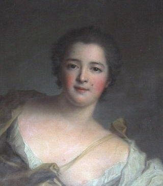 Diane Adélaïde de Mailly-Nesle, duchesse de Lauraguais (1713-1760), par Jean-Marc Nattier